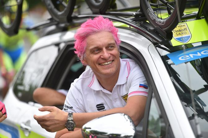 El empresario Oleg Tinkov durante una etapa